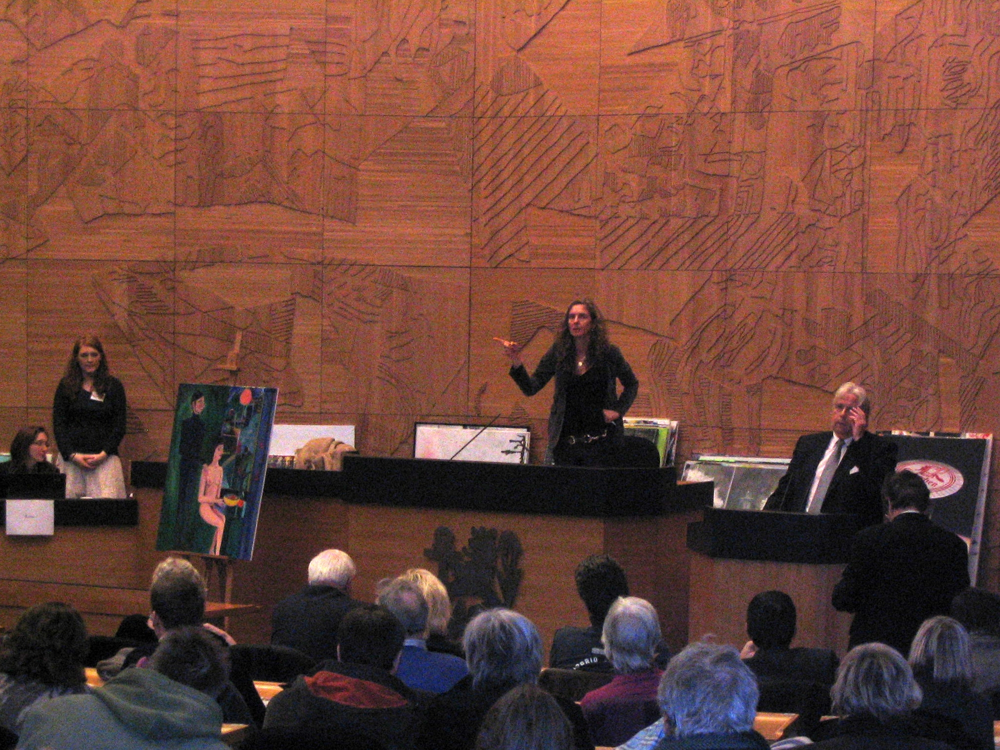 Düsseldorf, Plenarsaal des Rathauses: Mittlerweile 13. Neujahrsversteigerung 2012 zugunsten Düsseldorfer Kunststudenten. 10 Prozent der Einnahmen kommen einem wohltätigen Zweck zugute (2012: Kinderschutzambulanz vom „Sternthaler Düsseldorf e. V.“). Das Motto 2012 war: „Eine Stadt, eine Liebe - mein Düsseldorf“. Auktionator Karl-Heinz Theisen, Auktionsleitung Gabriela Maria Picariello. Die Auktion in 2012 erbrachte die Rekordsumme von 59.200 Euro (2011: 30.000 Euro), das teuerste Bild kostete 3600 Euro. Versteigert wurden 34 Bilder in der Größe 80 x 100 cm, die Leinwände waren von einer Düsseldorfer Brauerei gestiftet worden. Im Bild: Versteigert wird das Gemälde von Sarah Buckner, "ohne Titel".